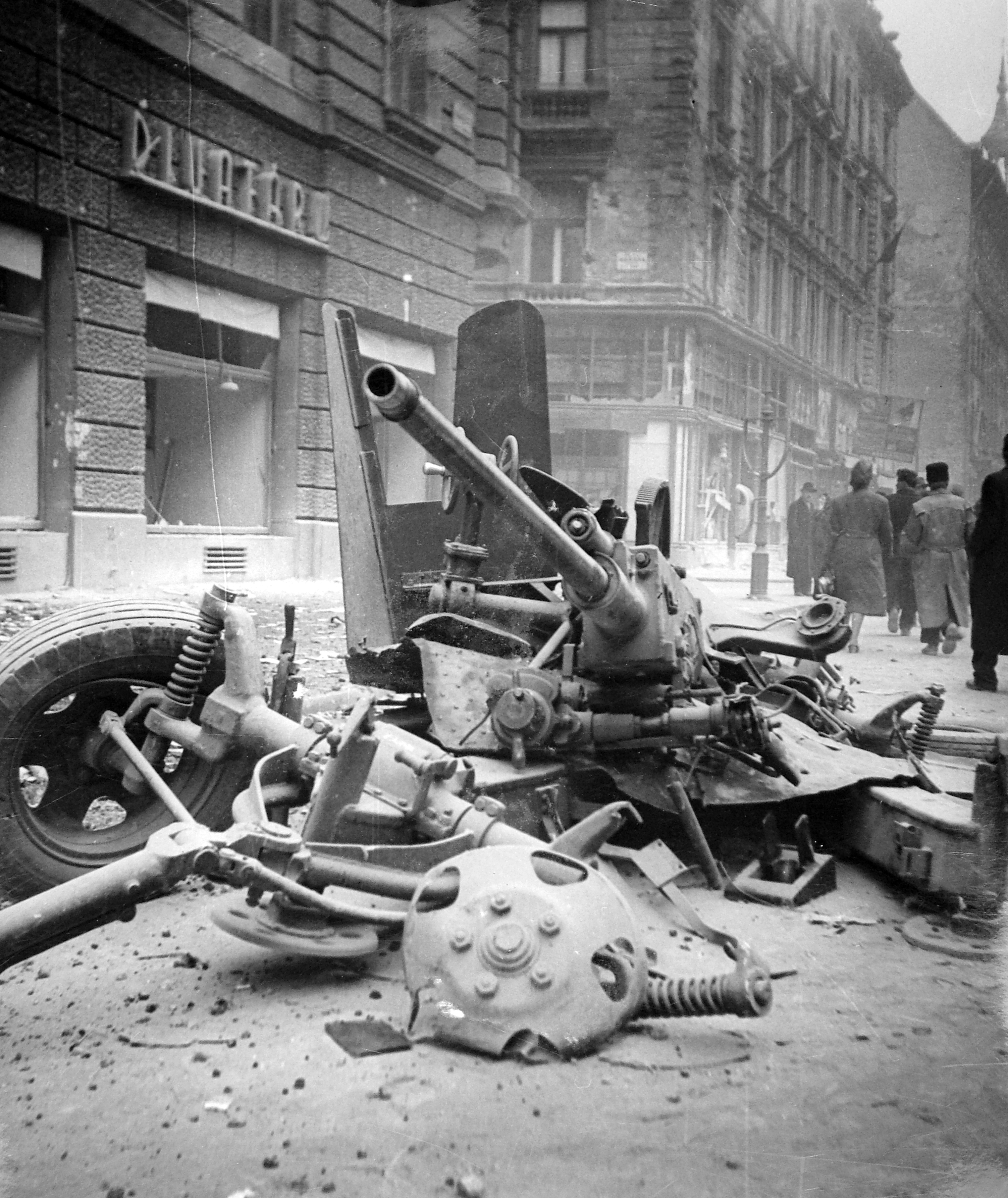 Rákóczi út, a Hársfa utca torkolata. Location: Hungary, Budapest VII. Tags: revolution, street view, wreck, store display, pedestrian, damaged building, Budapest, cannon, air defense Title: Rákóczi út, a Hársfa utca torkolata.